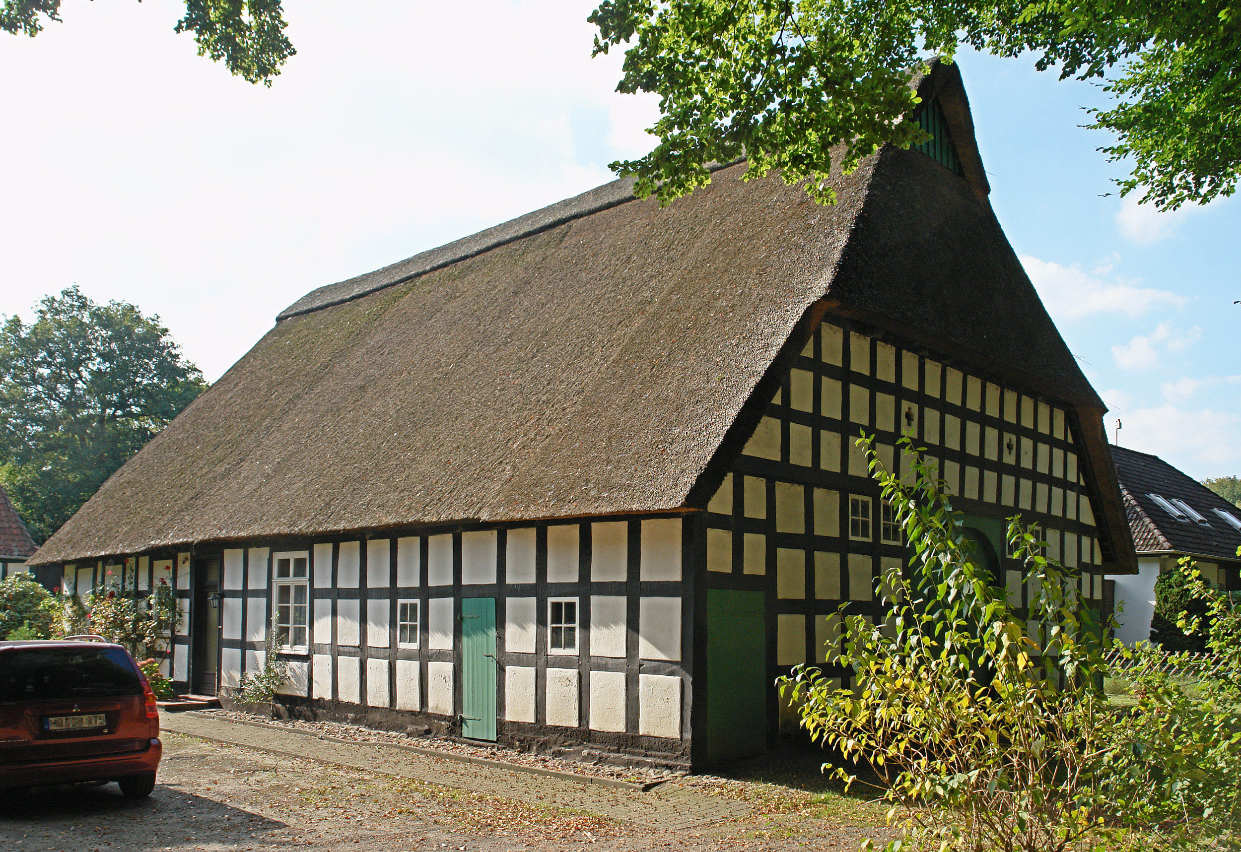 Bauernhaus in Bremen, Oberneulander Landstraße 24Das abgebildete Objekt ist ein geschütztes Kulturdenkmal in der Freien Hansestadt Bremen, mit der Nr. 3913 beim Landesamt für Denkmalpflege registriert.